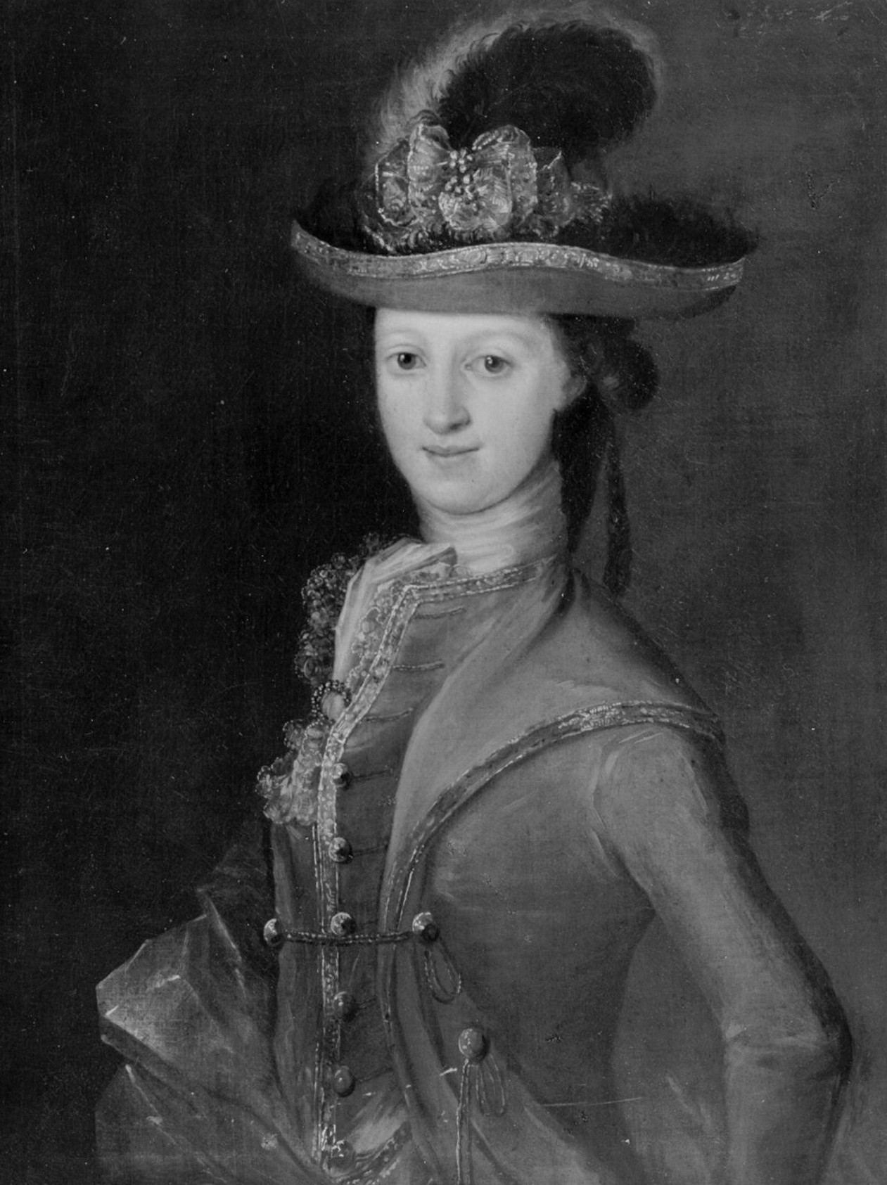 Søster Huitfeldt gift Sibbern, Norsk Folkemuseum L 2109 og Væring